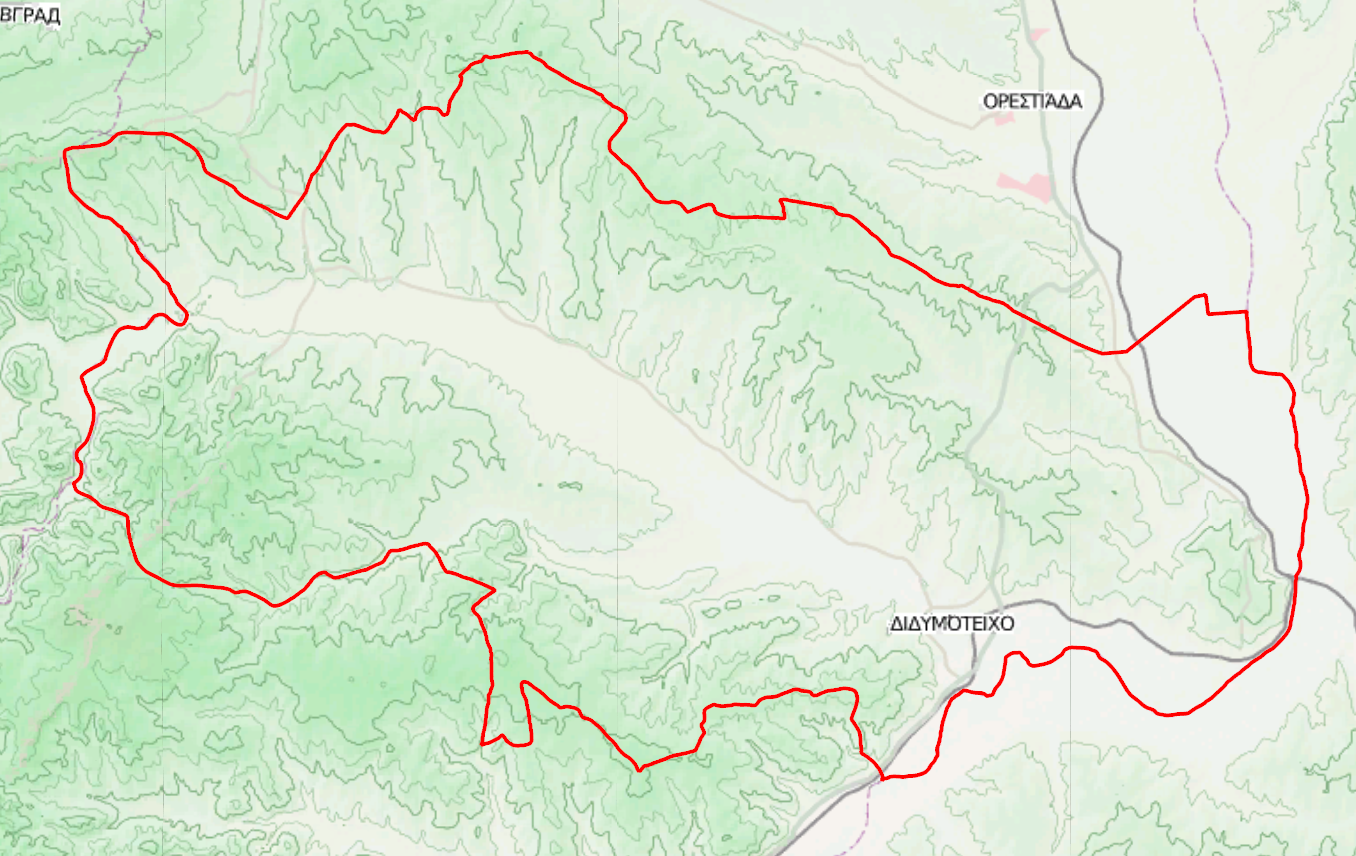 Τοπογραφικός χάρτης του Δήμου Διδυμοτείχου.